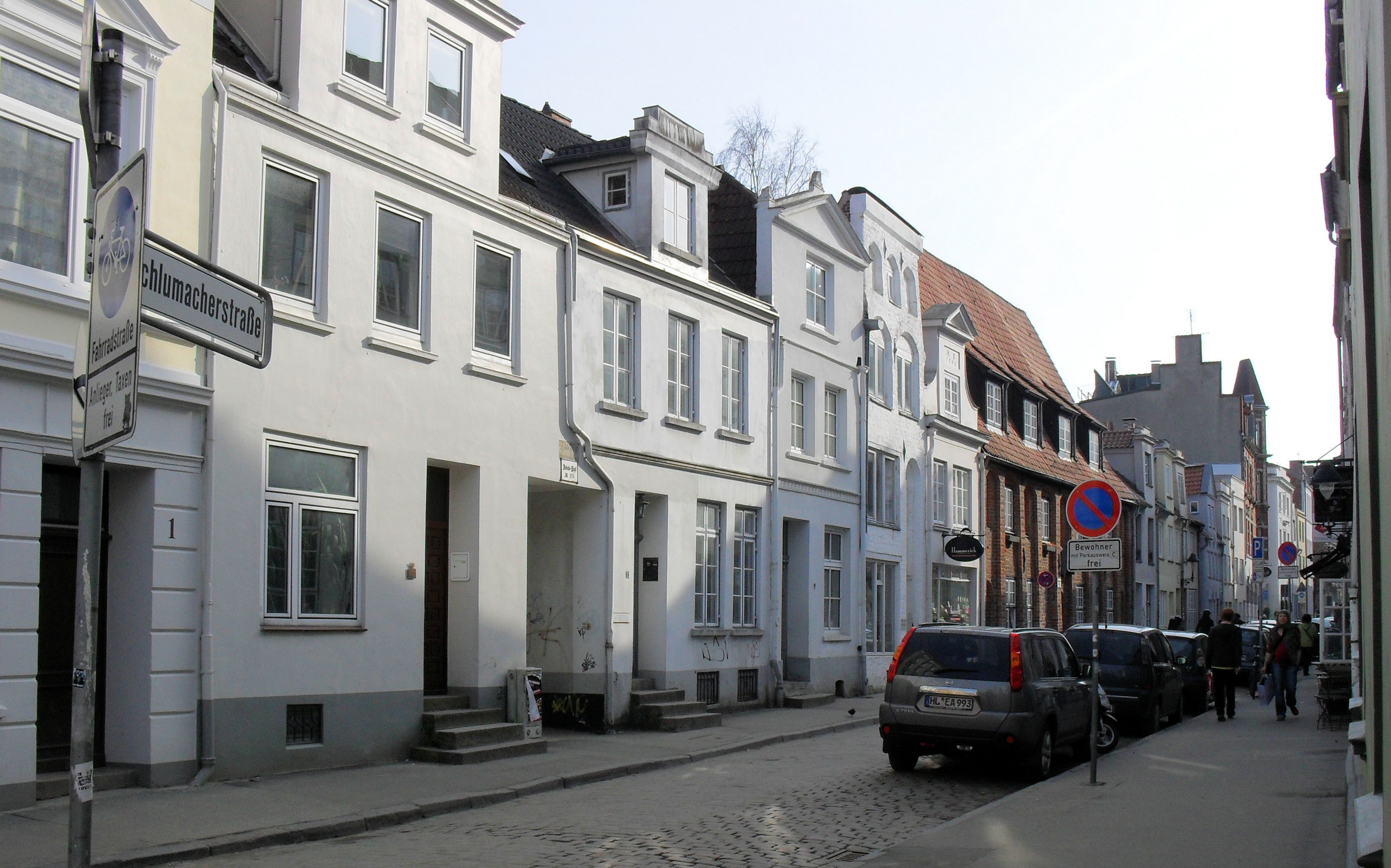 Die Schlumacherstraße in Lübeck